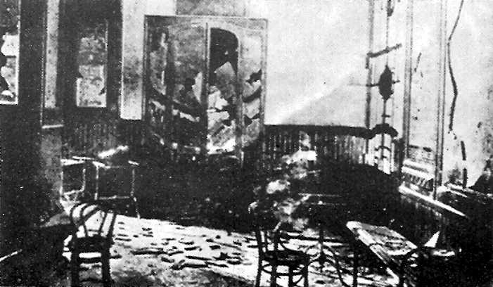 La Chambre du Travail incendiée par les fascistes à Turin, 19 décembre 1922